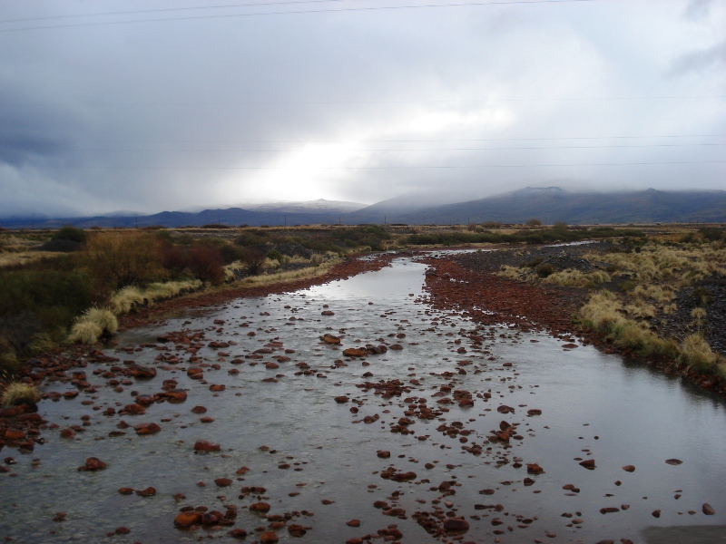 Vista al oeste del río Agrio al cruzar el puente sobre la ruta provincial 21 en la provincia de Neuquén, Argentina.